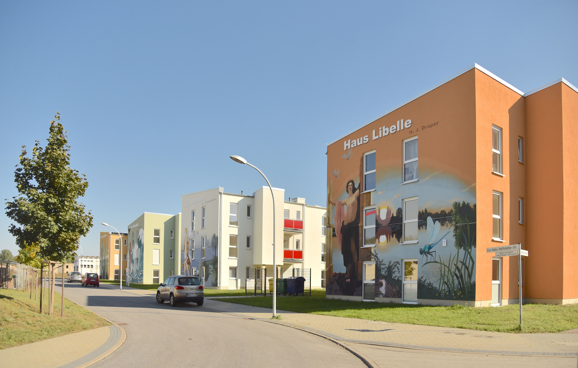 4 Wandbilder, ALTERSGERERECHTES WOHNEN „WOHNEN AM SEE“ , 2015 Zernsdorf, Iris-Hahs-Hoffstetter-Str